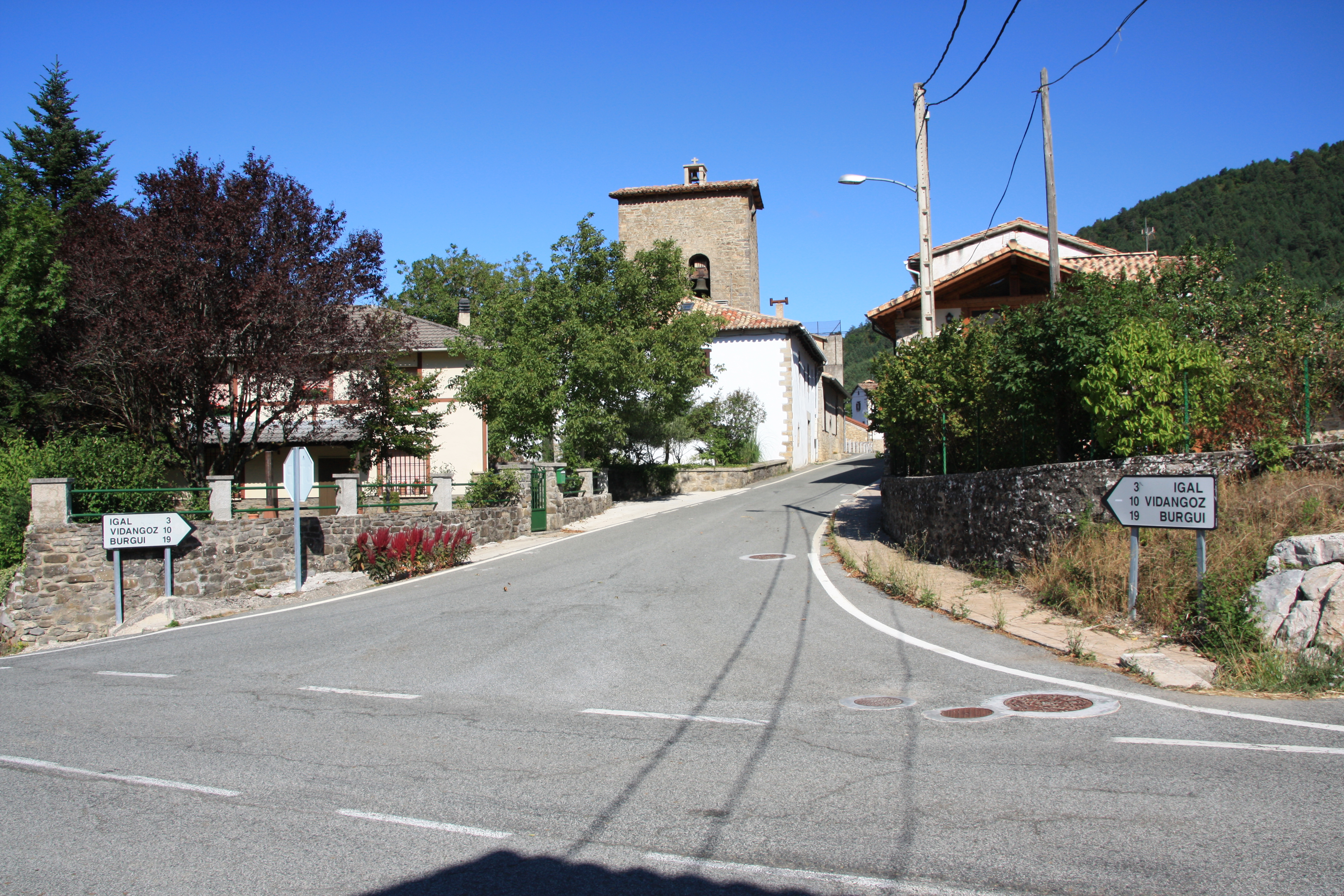 Gorza errepidetik ikusia.